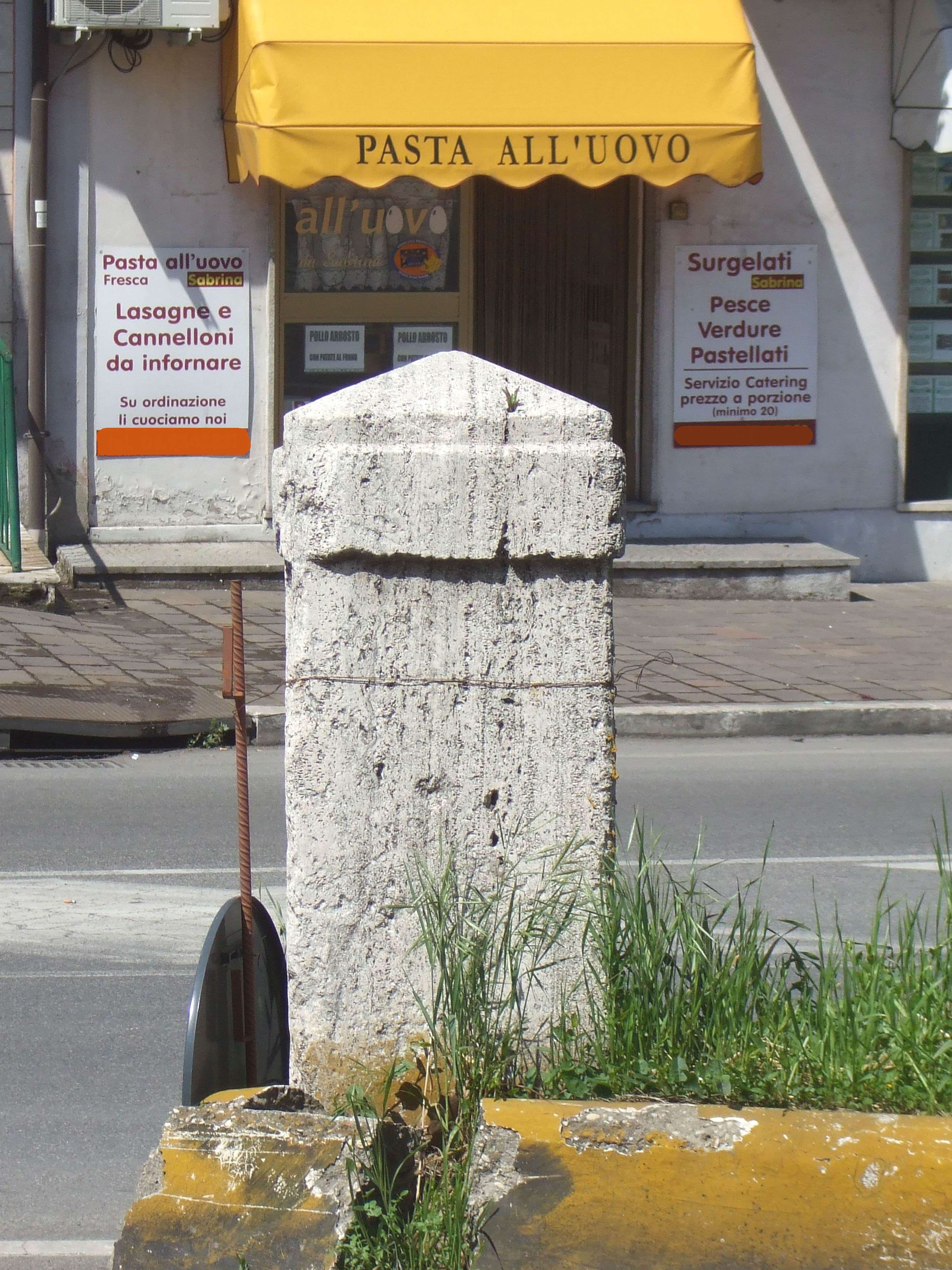 Cecchina di A.L. - ceppo miliare Cecchina centro bivio Genzano